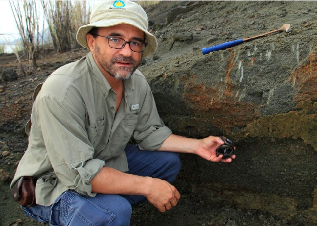 Profesor Camilo Montes, profesor de la Universidad del Norte